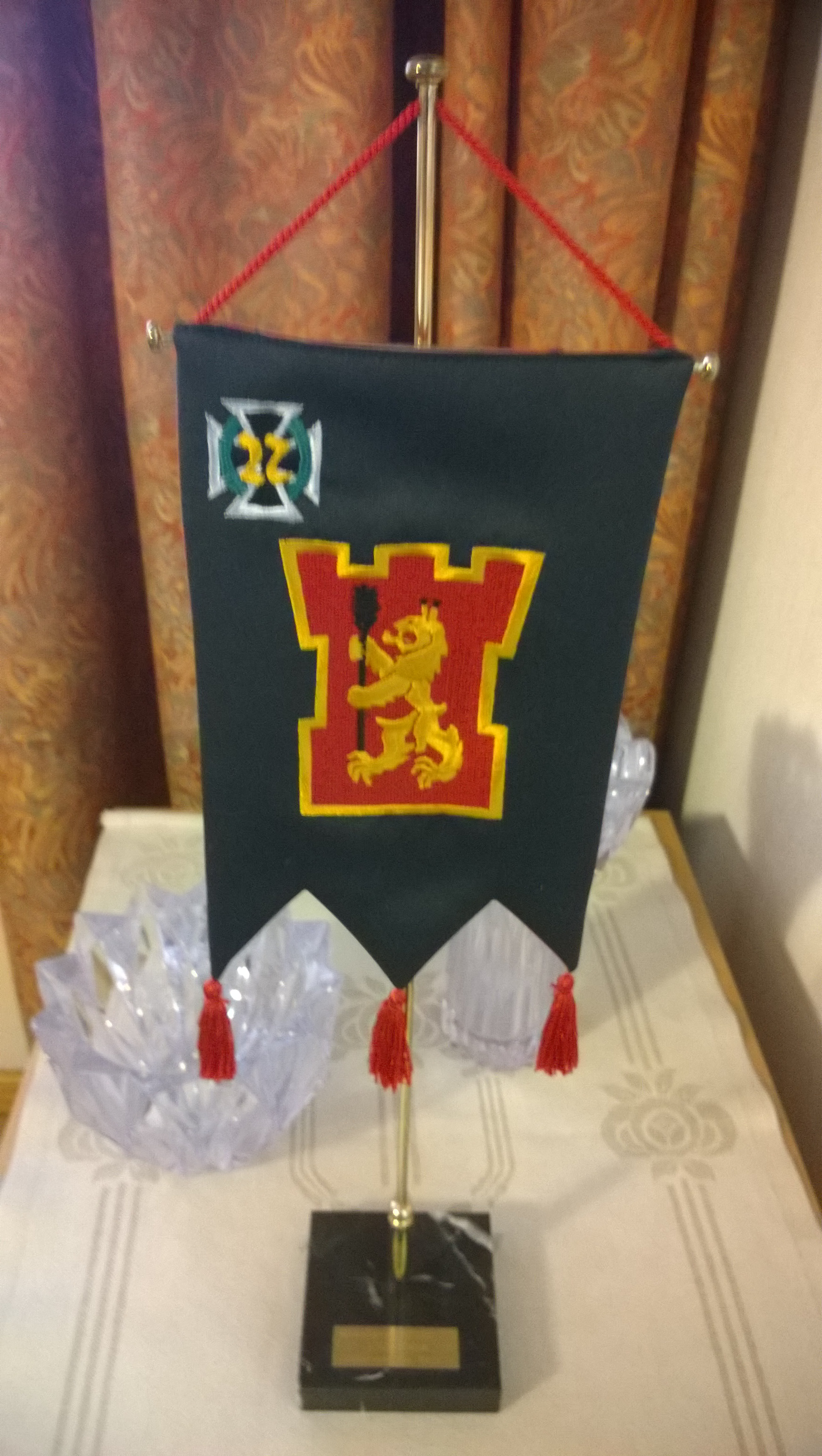 Jääkäritykistön standaari: ”Kevyt Patteristo 11, 3.12.2008, Jääkäritykistön Kilta ry”.